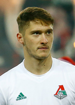 «Локомотив» - «Краснодар»